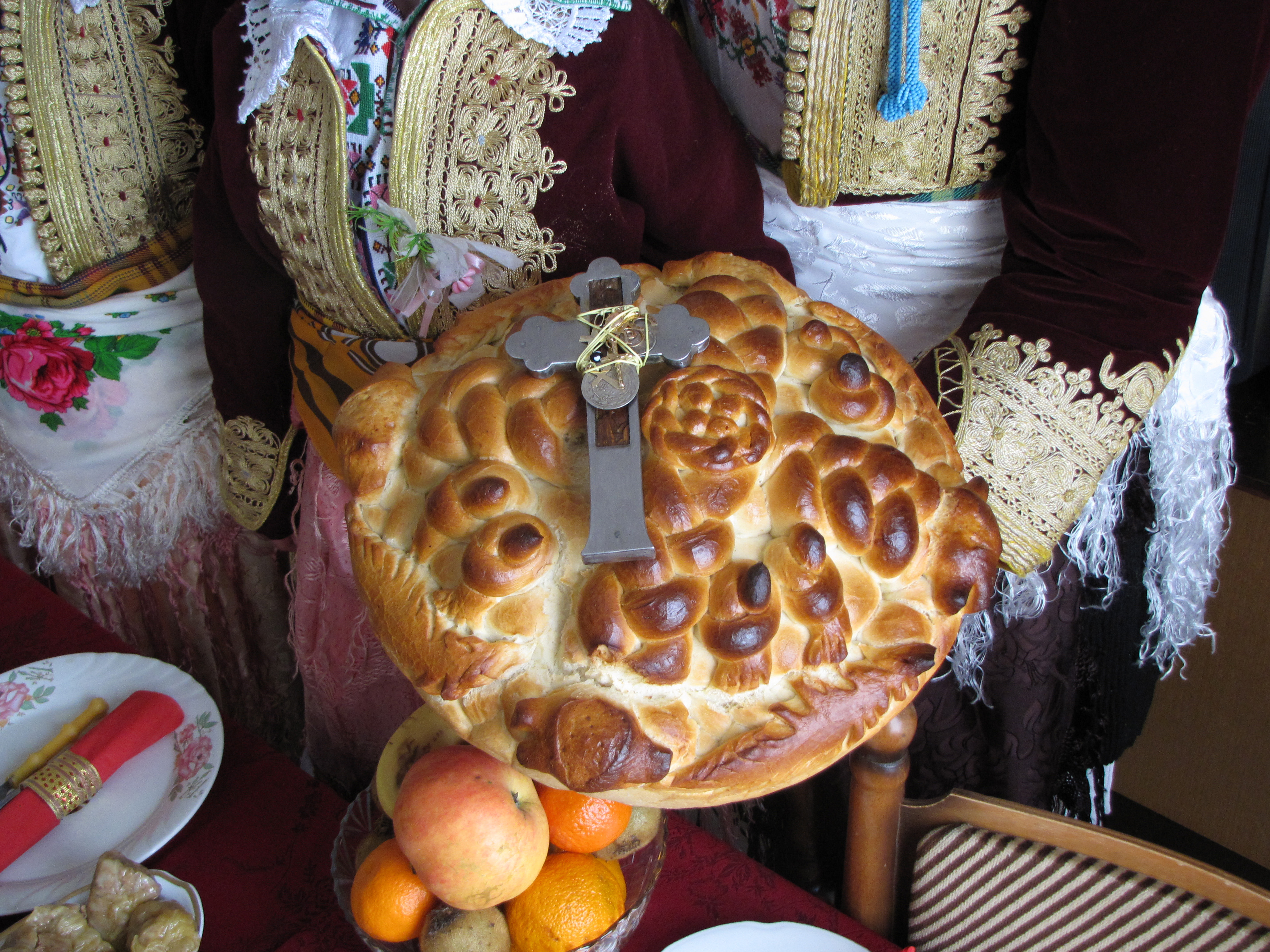 Погача наменета за слава с.Стенче горни Полог